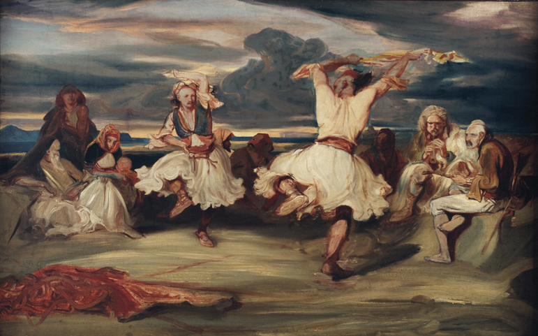 Généralement caractérisée par son épaisseur, la touche du peintre est ici plus fine et rapide, laissant penser qu’il s’agit d’une esquisse. Occupant le centre du tableau, deux danseurs en mouvement se font face dans une sorte d’affrontement. Ils sont entourés par plusieurs personnages : à gauche, se trouvent des musiciens, dont l’un souffle dans un « zuma » (sorte de hautbois à forme conique), tandis que l’autre joue d’un instrument à cordes pincées. La scène est inscrite dans un paysage naturel : elle se détache sur un ciel crépusculaire qui contraste, en partie inférieure, avec l’intensité du bleu de la mer.